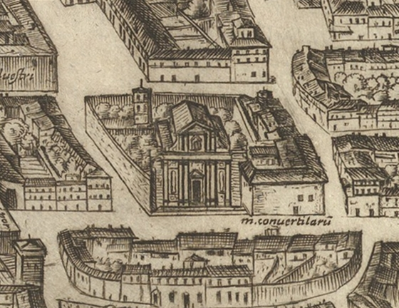 Pianta di Tempesta